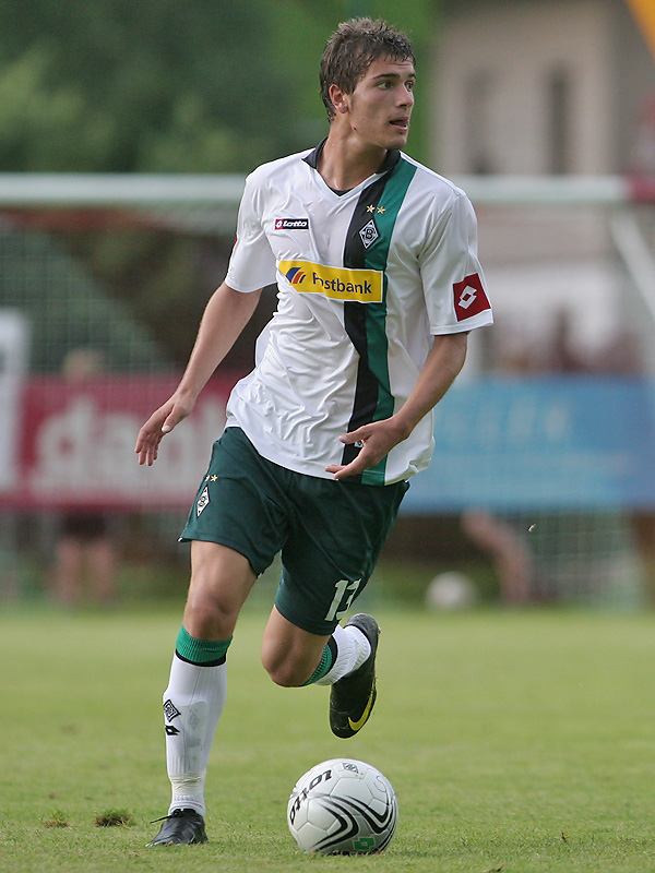 Roman Neustädter sucht seine Mitspieler - Borussia Mönchengladbachs Neuzugang beim Testspiel gegen den FC Dundee